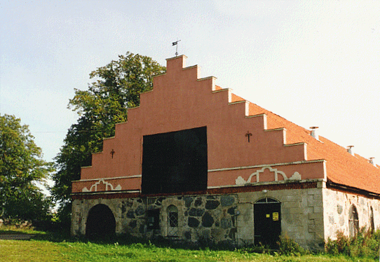 Fiholmen Jader